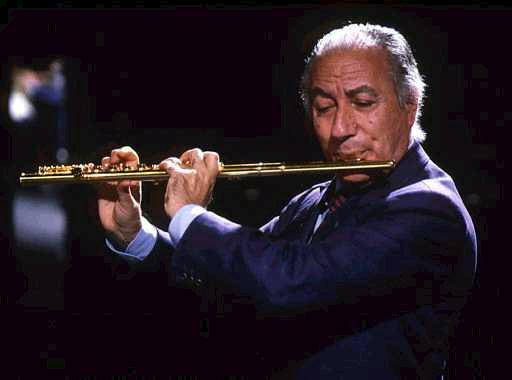 foto del flautista italiano Severino Gazzelloni (1919-1992) durante un suo concerto a Roma nel 1986